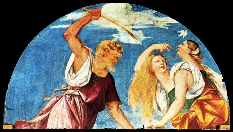 Philomela, Procne e Tereus. affresco di Sebastiano Del Piombo, VillaFarnesina